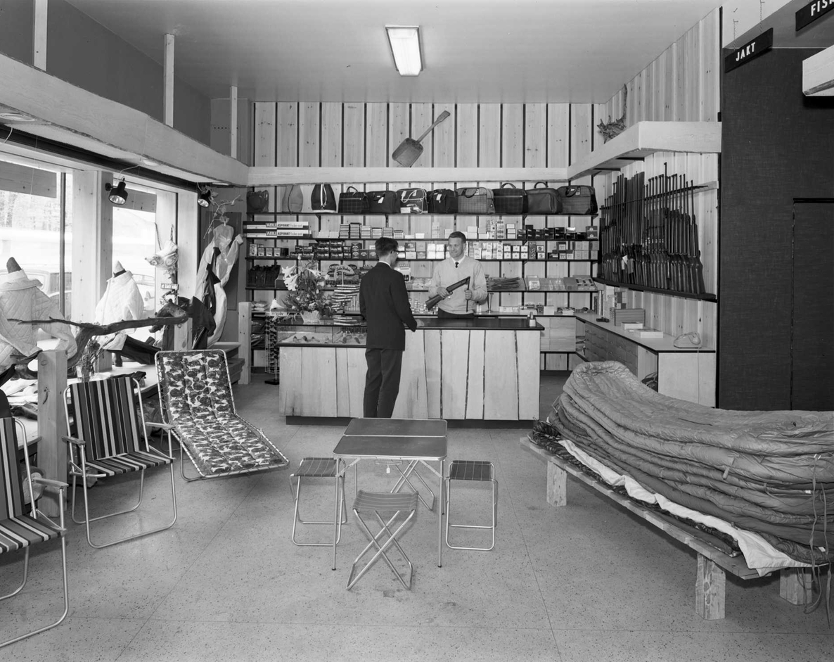 Ludv. Torgersen sportsforretning i Huitfeldts gate 1 (senere Drammensveien 10, nå Henrik Ibsens gate 36) i 1964. Foto: Aterlier Rude, fra Byhistorisk samling hos Oslo Museum.